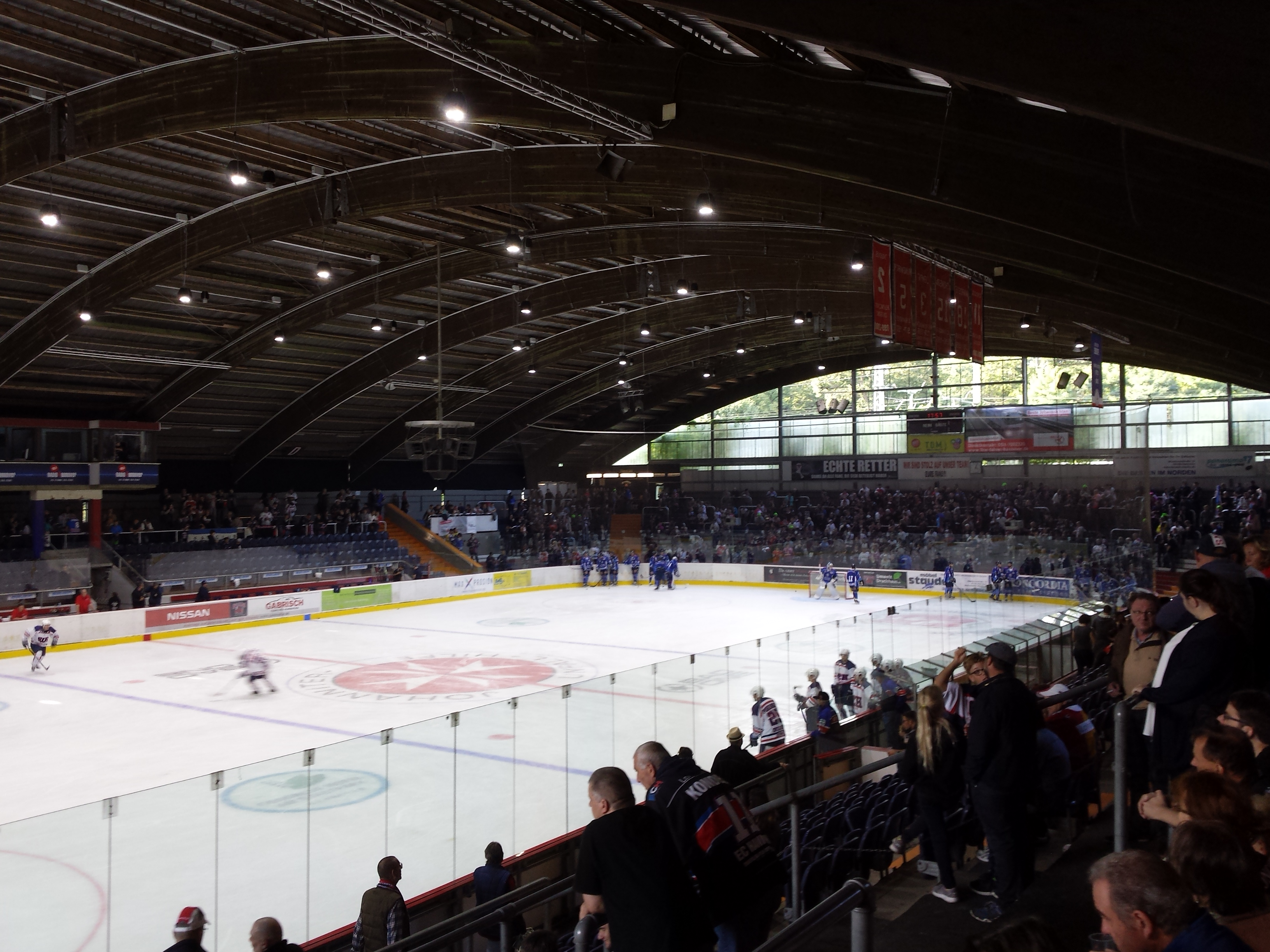 Eishockey-Vorbereitungsspiel zwischen den EC Hannover Indians und den EC Kassel Huskies am 2.September 2017 im Eisstadion am Pferdeturm, Hannover. Vor dem Spiel, Blick auf die Nordkurve.